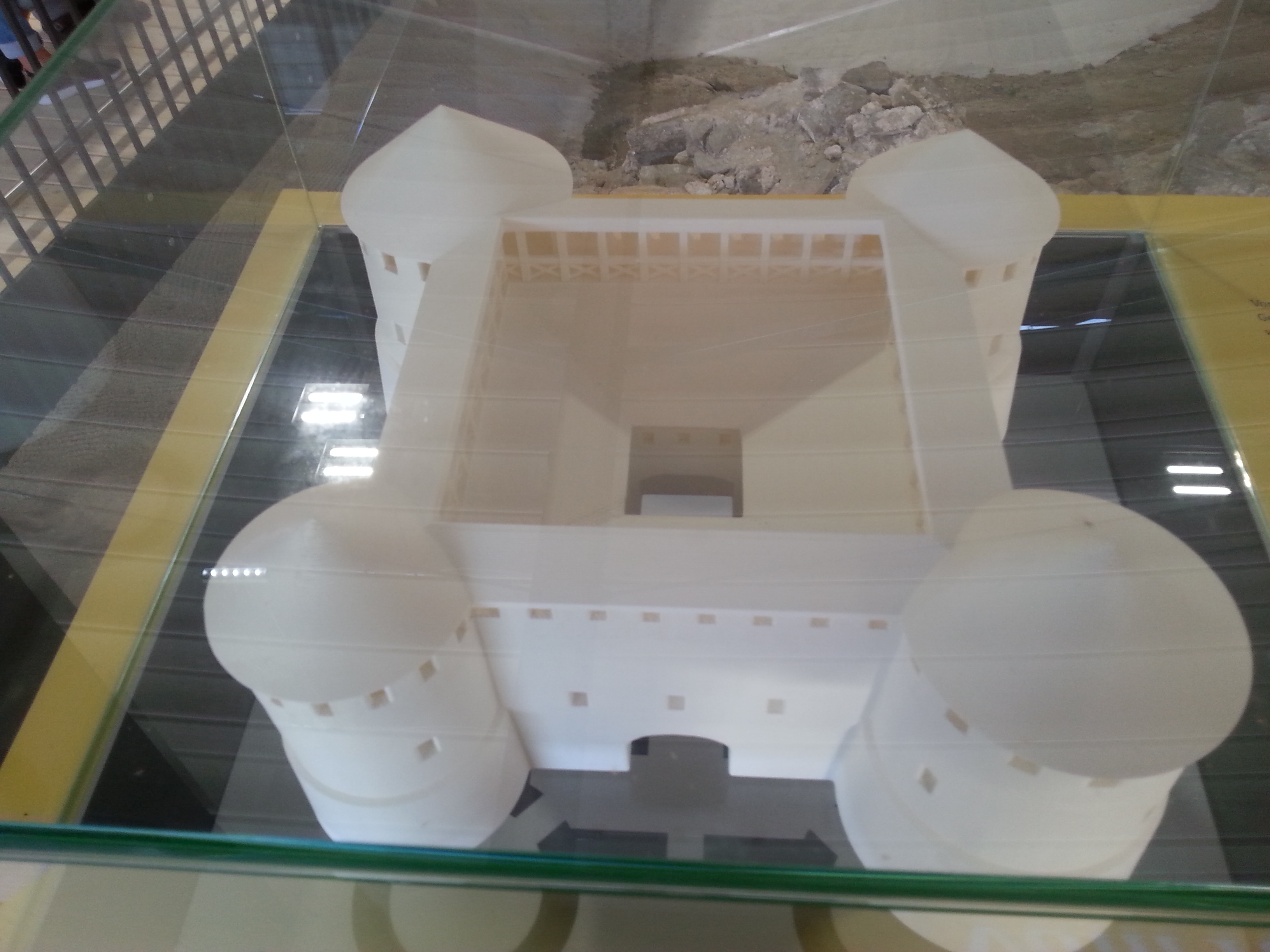 Rekonstruktionsmodell des spätantiken Burgus von Oberranna, Österreich.